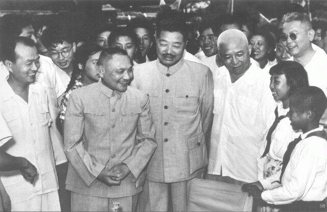 1956年，李先念、刘澜涛、贺龙、邓小平、胡乔木（自右至左）同小朋友在一起。